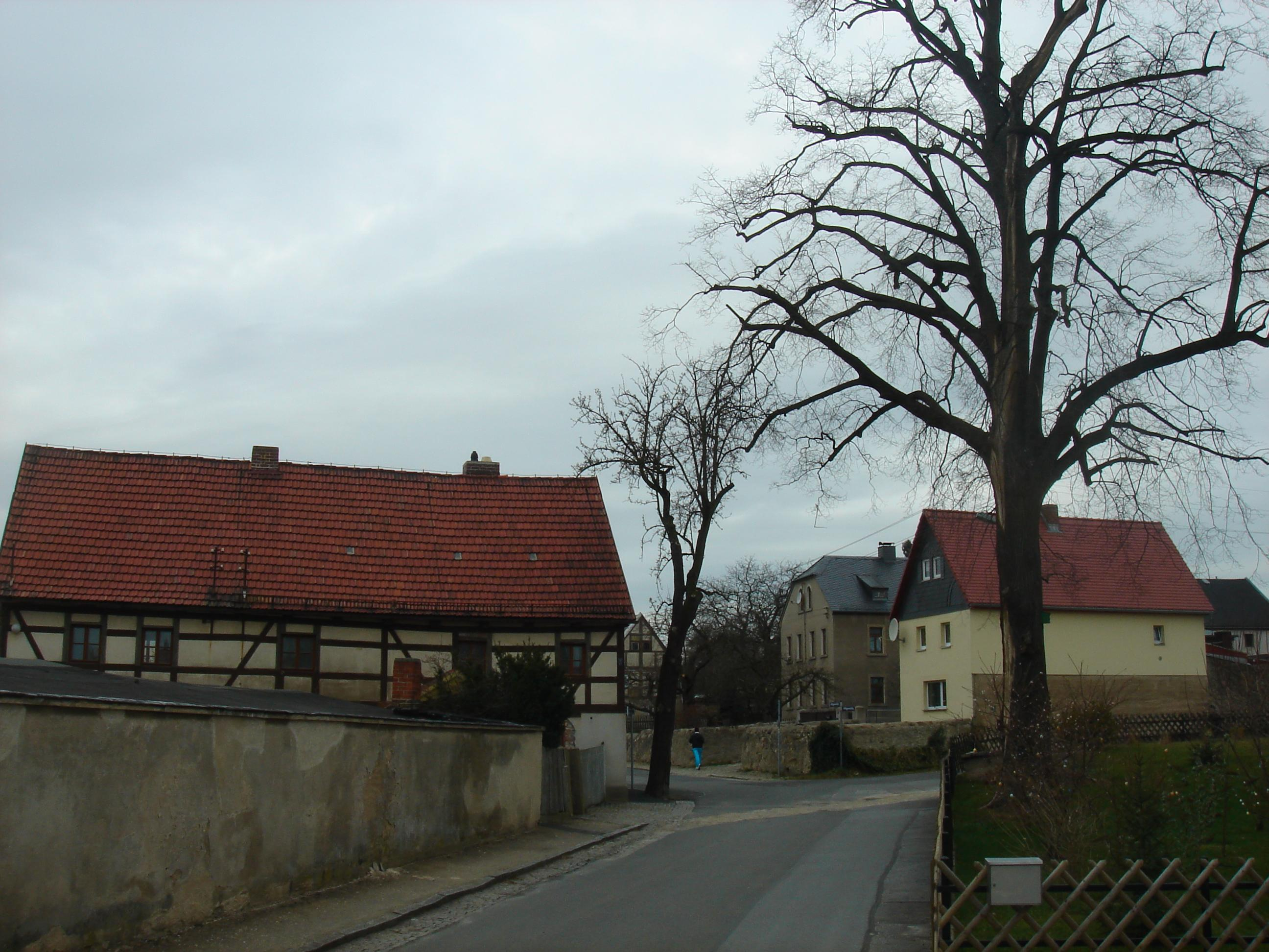 Dorfkern "Altgomlitz" in Gomlitz, Ortsteil von Dresden